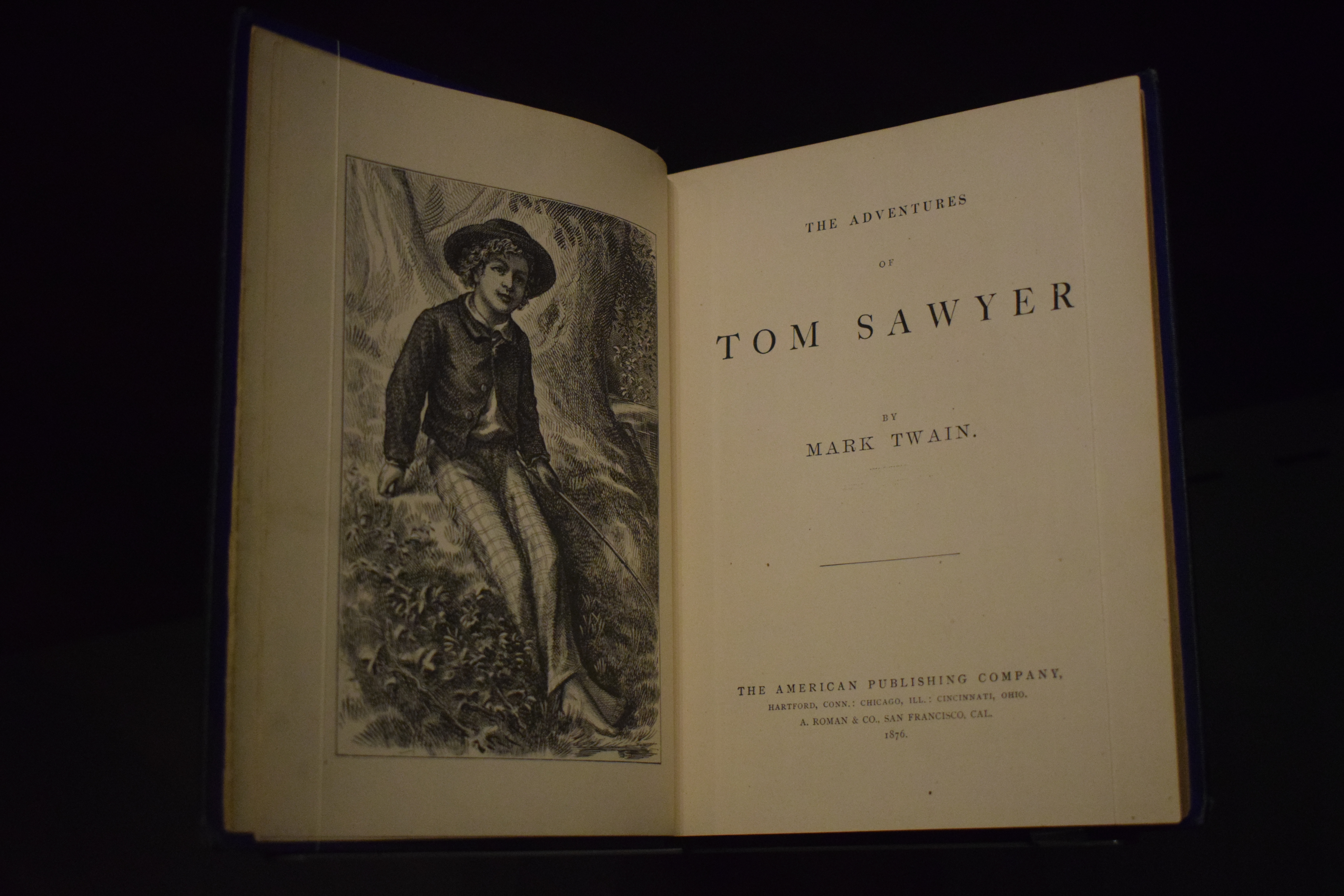 « The Adventures of Tom Sawyer » de Mark Twain (1835-1910). New York, 1876. Première édition américaine, ici exposée à la Fondation Martin Bodmer à Cologny (faubourg de Genève) en Suisse.